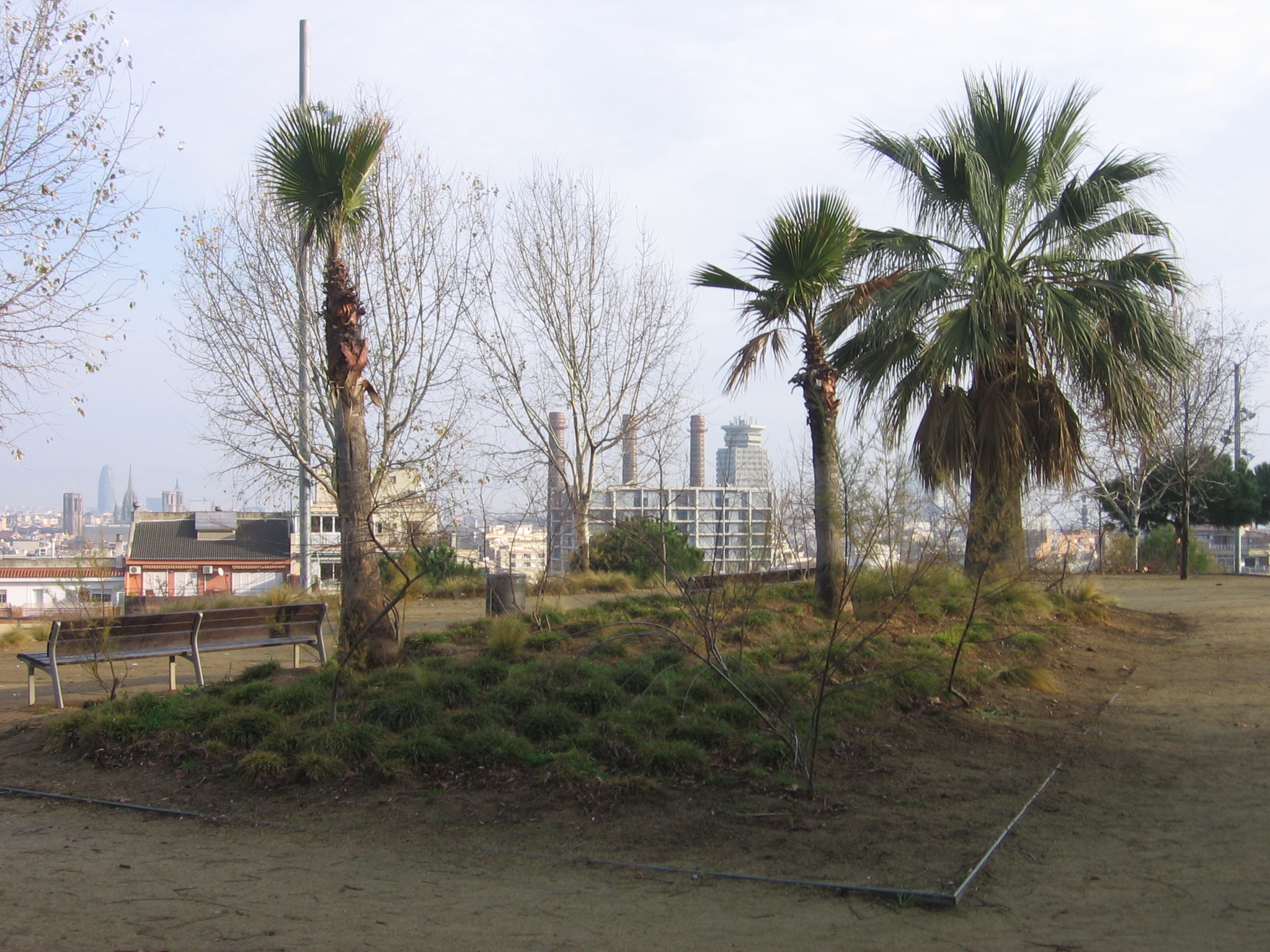 Parque de la Primavera.